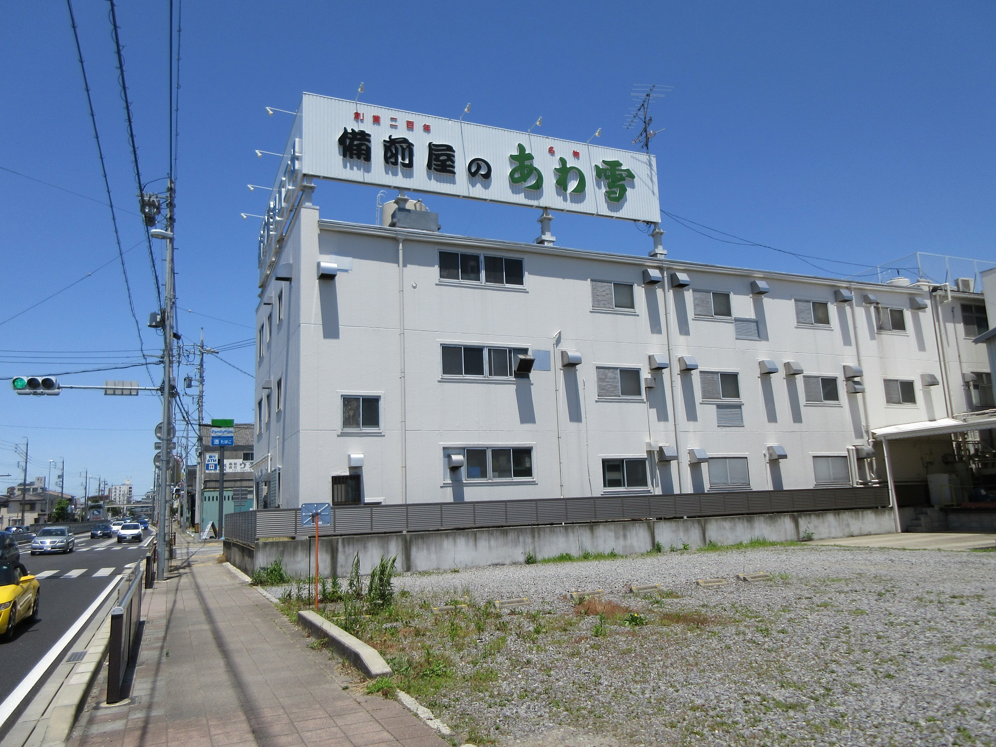 備前屋・根石工場（岡崎市根石町）